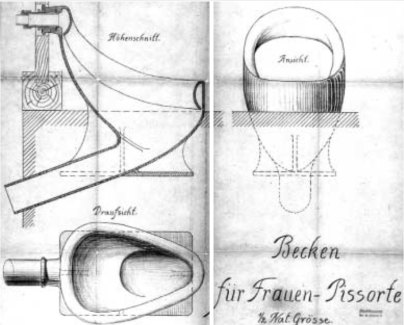 Damenurinal für den Piss-Ort für Frauen, München, 1906